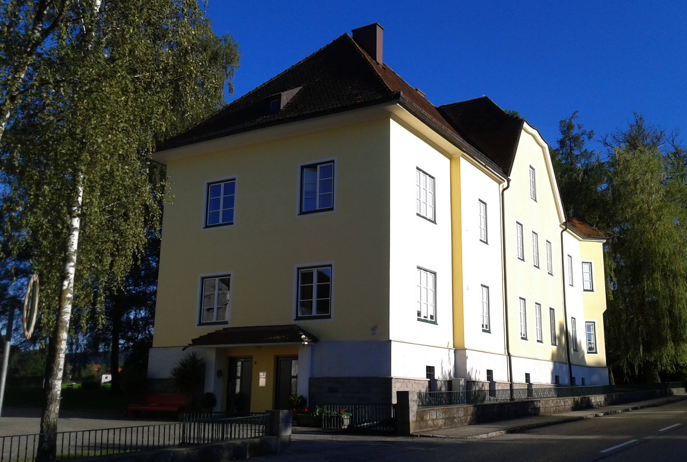 Pramet, Haus Pramet Nr. 5, Sterbehaus von Vinzenz Freiherrn von Fox (1859–1931), k.u.k. General der Infanterie